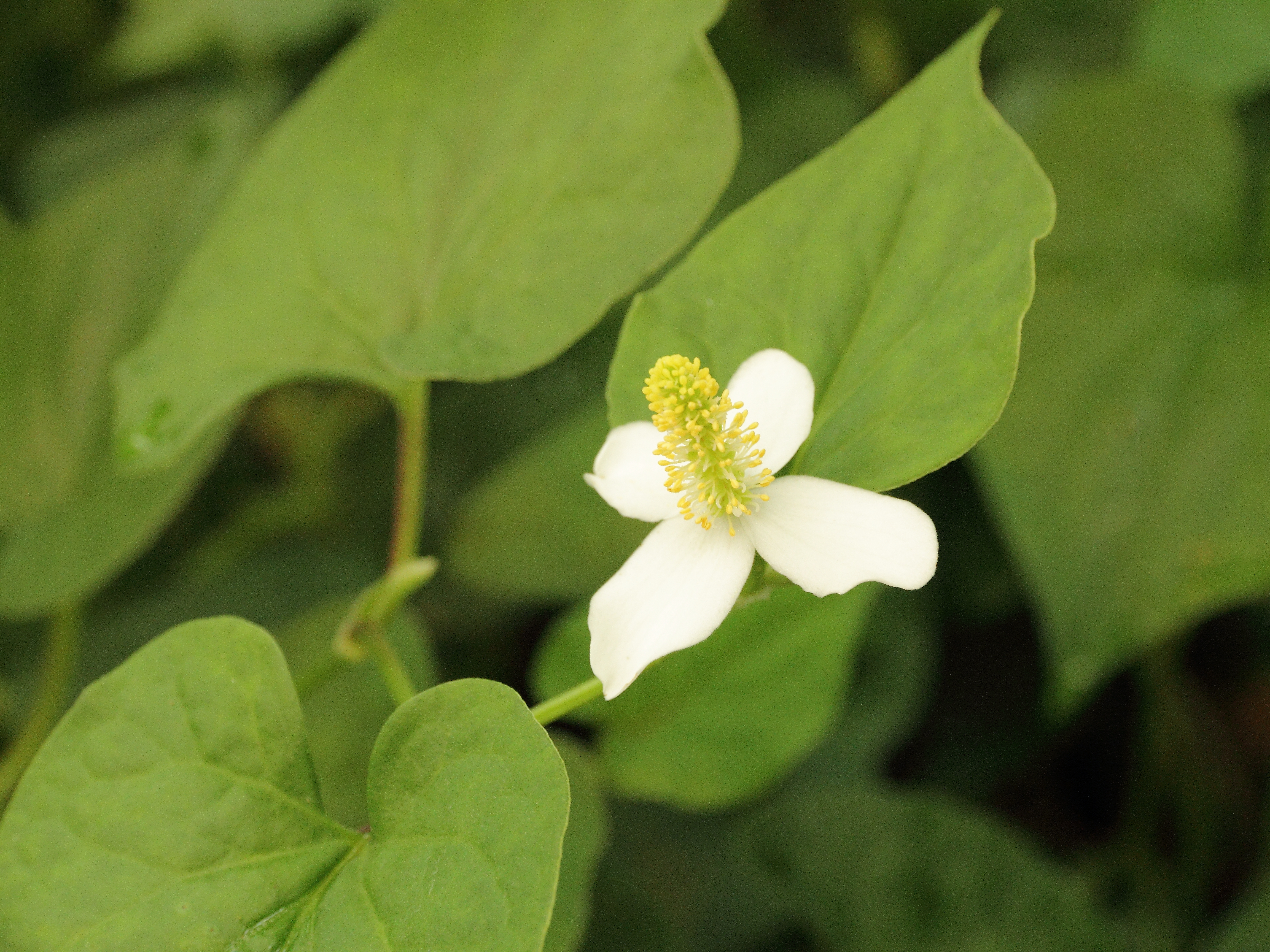 Houttuynia cordata i Bergianska trädgården.